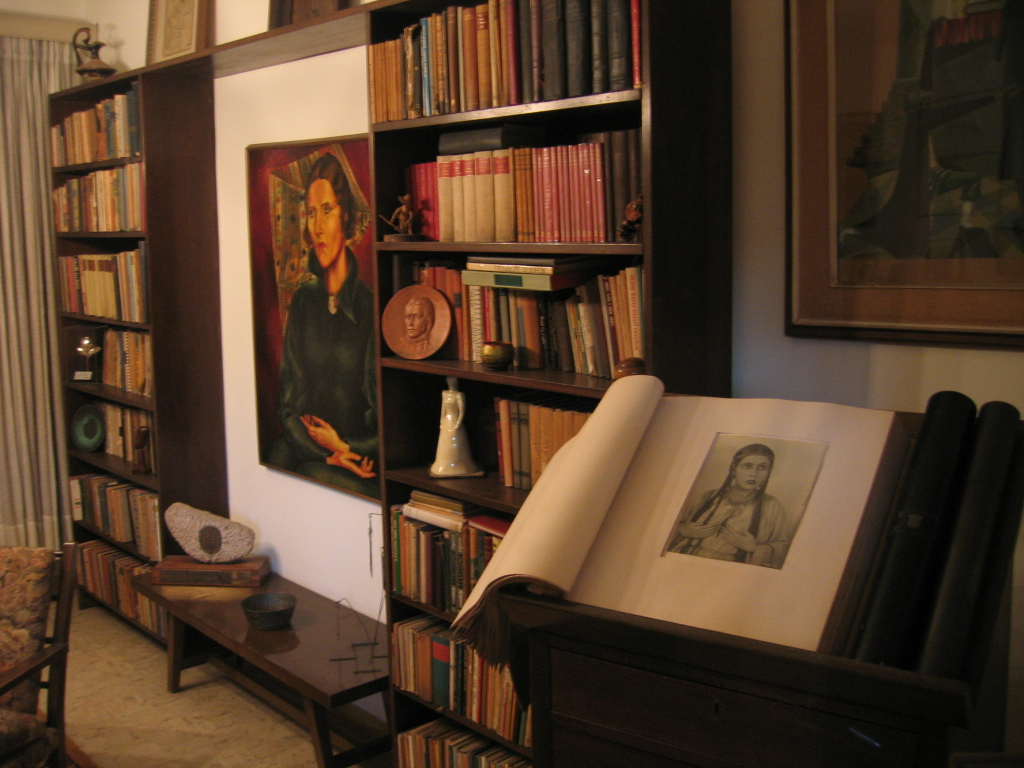 Hanna Rovina rooms in Habima National Theatre קטגוריה:חנה רובינא קטגוריה:הבימה